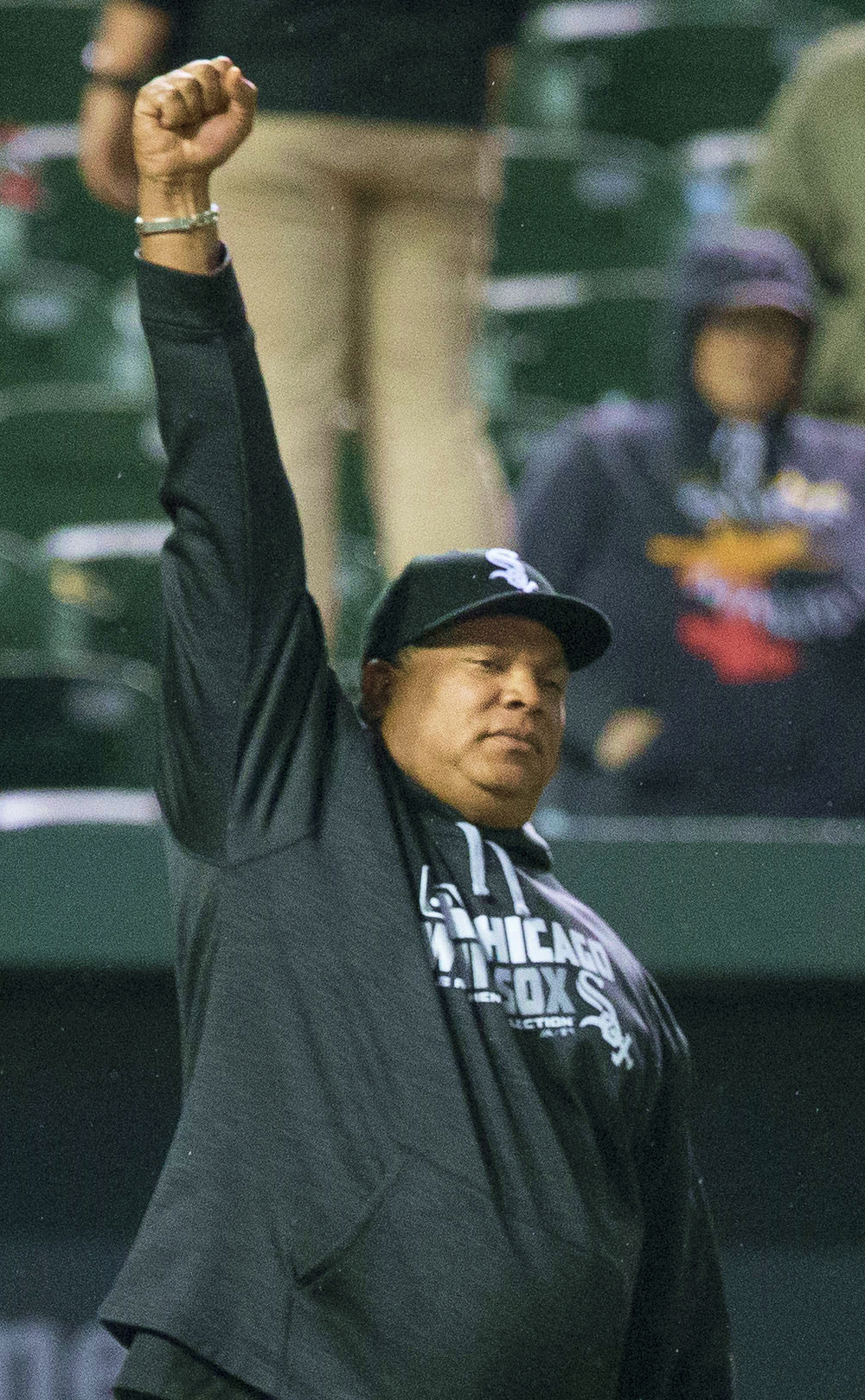 Todd Steverson